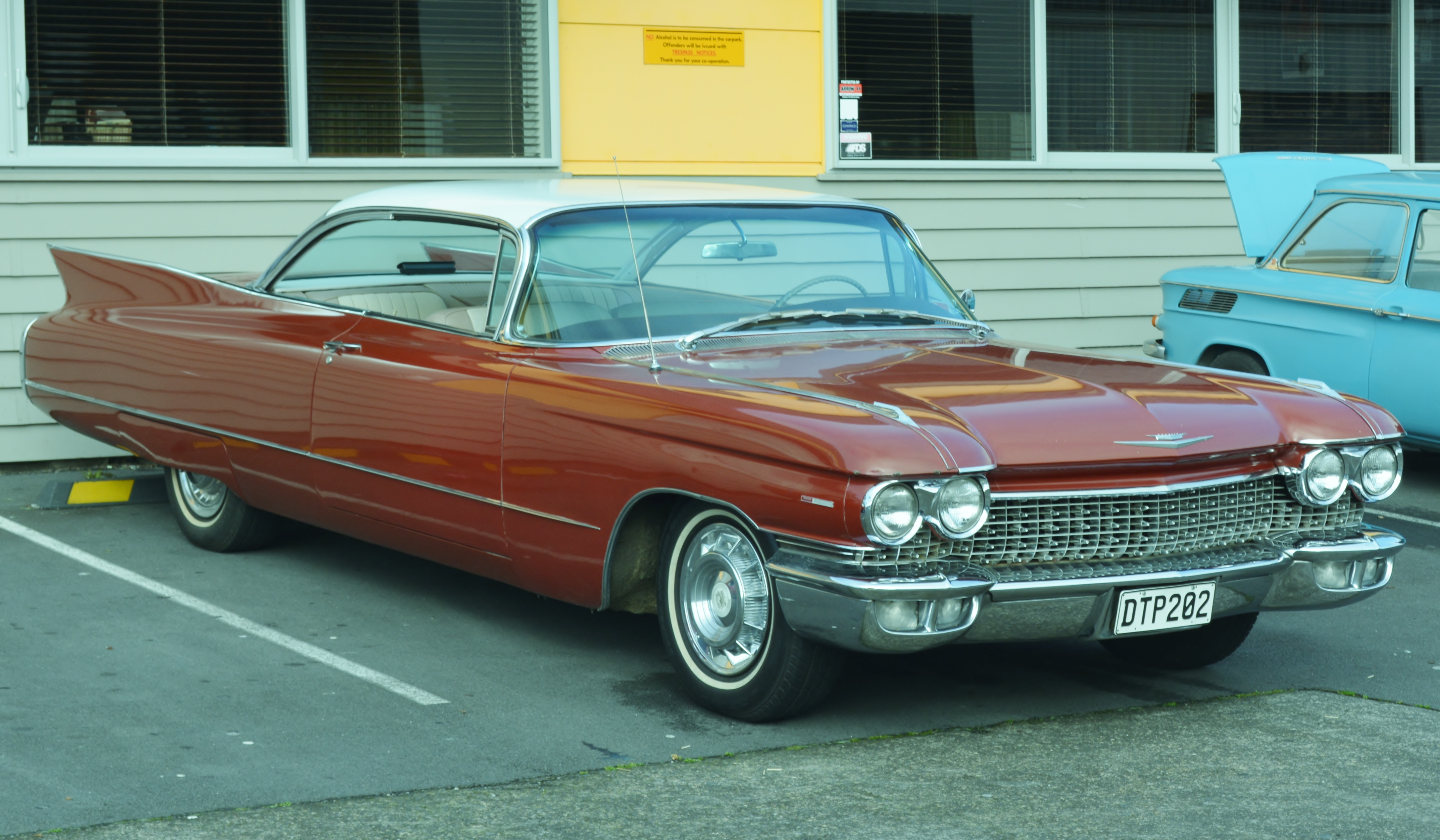 Hanger Bar Henderson,West Auckland.New Zealand